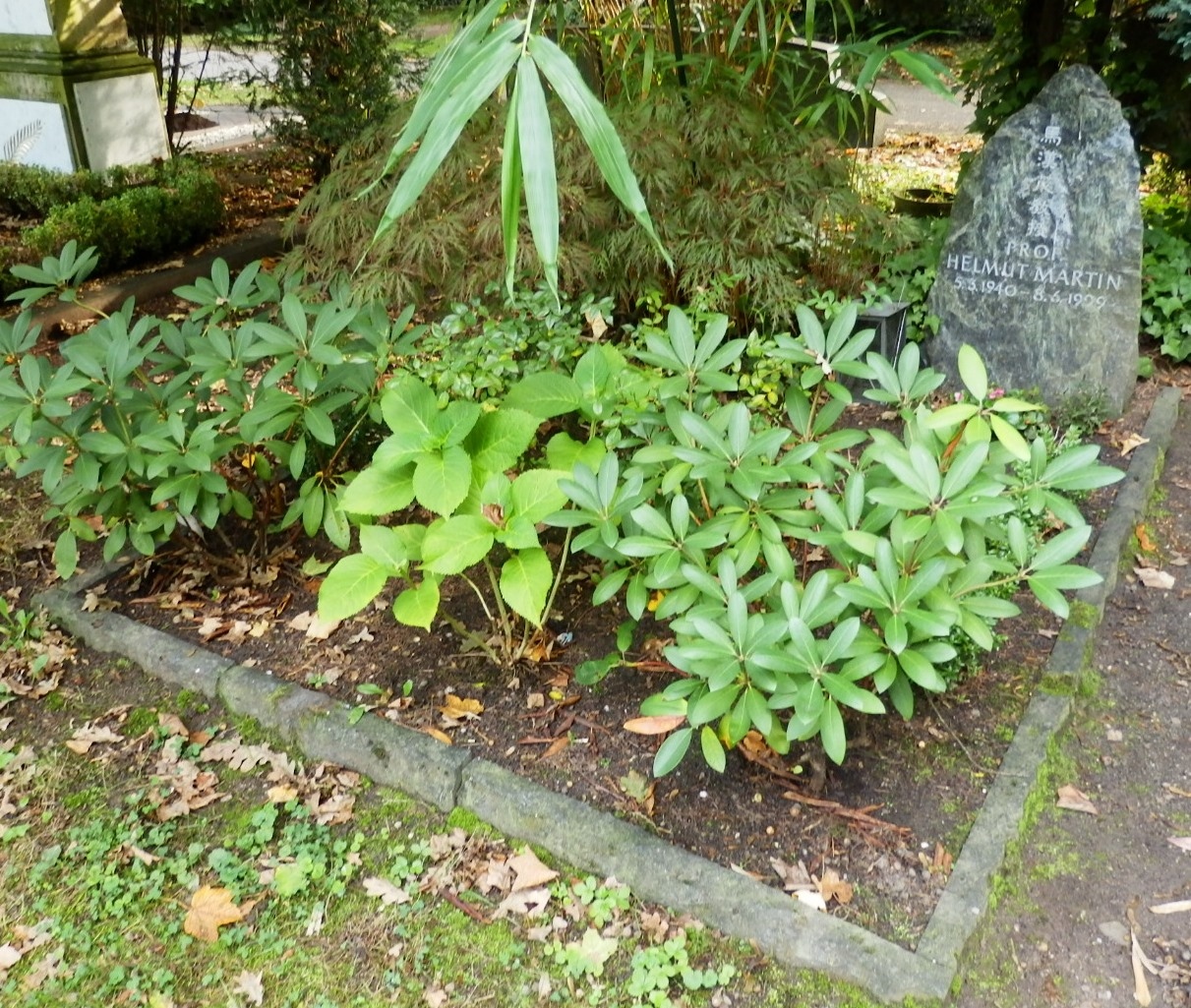 Helmut Martin - Melaten-Friedhof